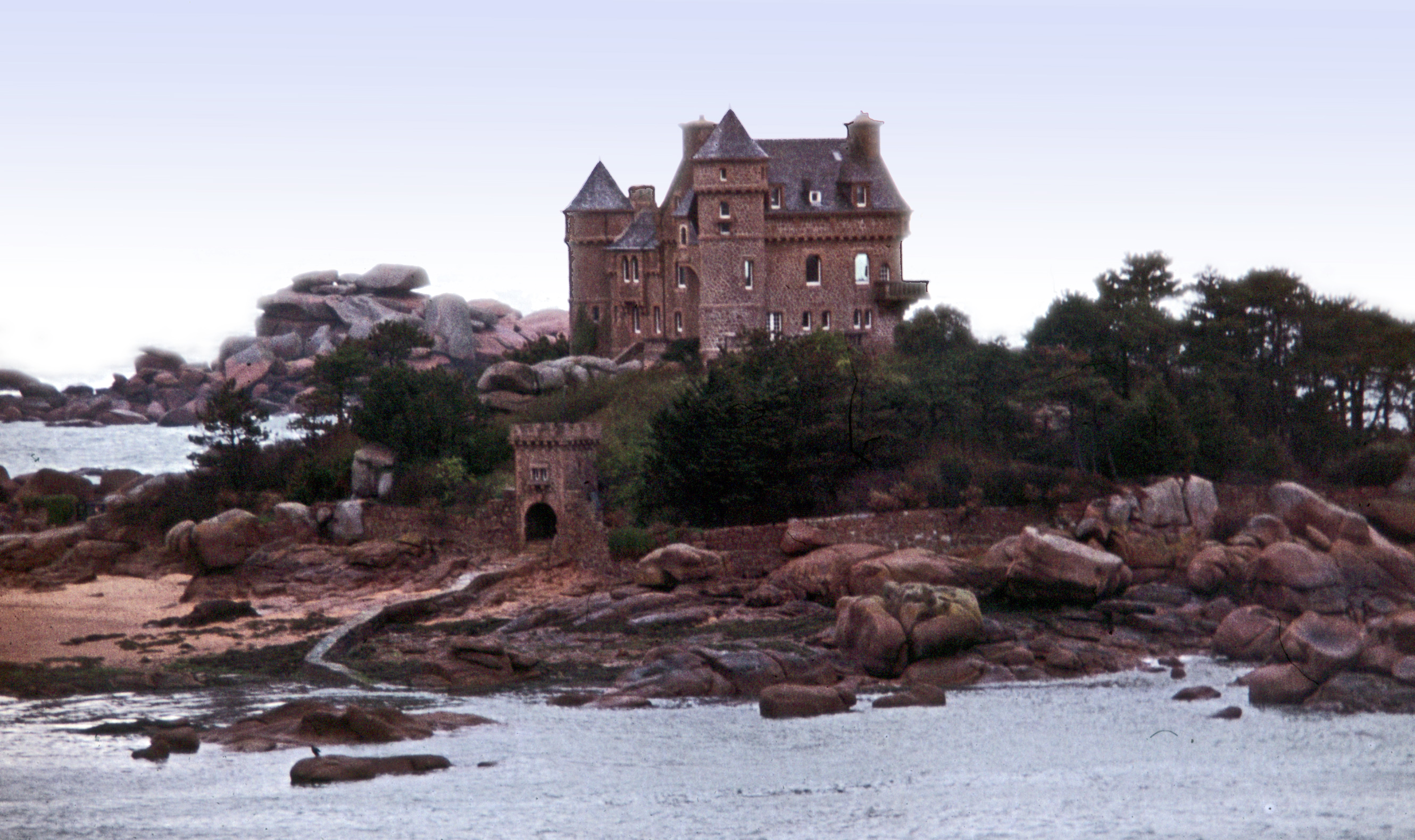 Trégastel, Château de Costaérès 1978